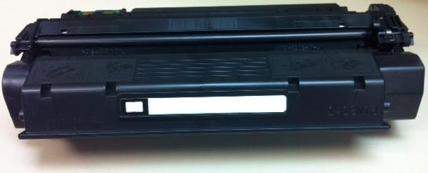 Cartucho de Toner para impressora laser